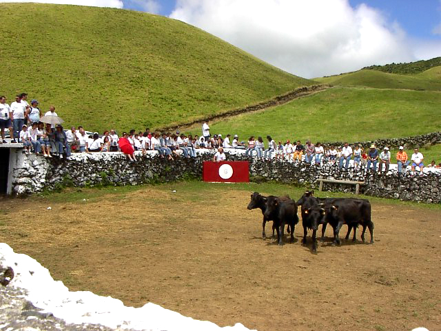 Festas tradicionais dos Açores, Touradas na ilha Terceira. Tentadero, ilha Terceira, Açores, Portugal